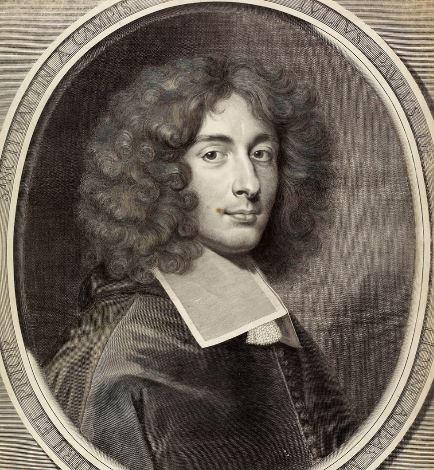 Portrait de Jules-Paul de Lionne.